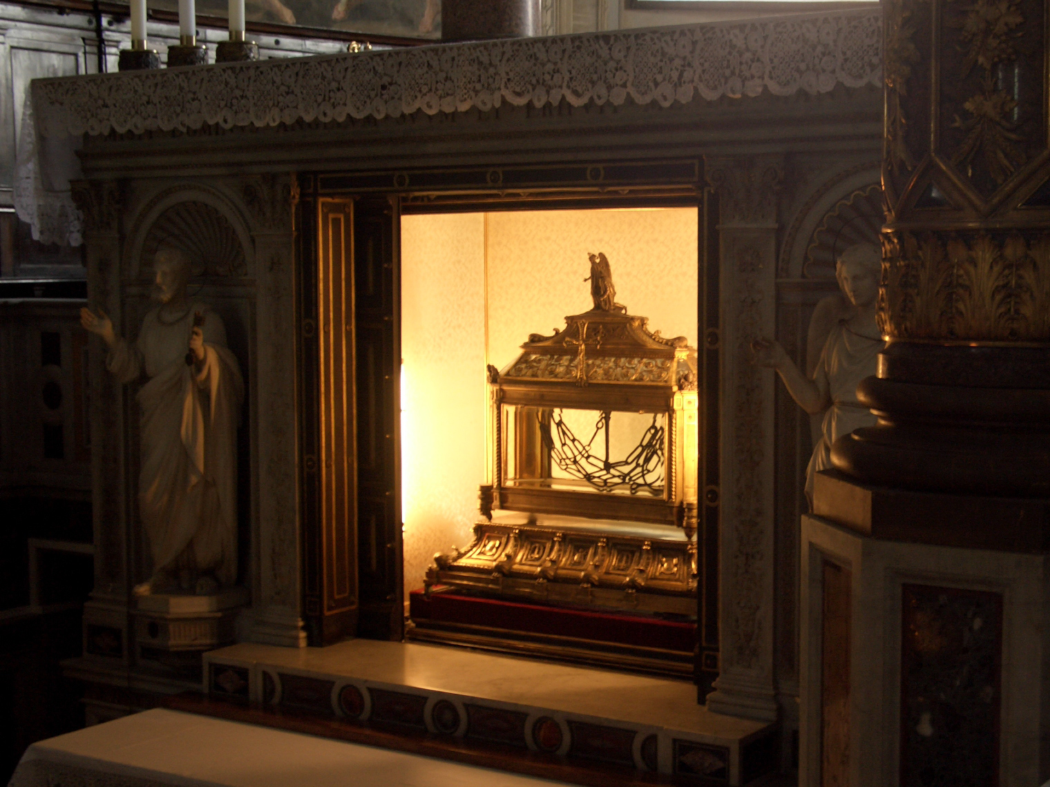 Roma, Italia